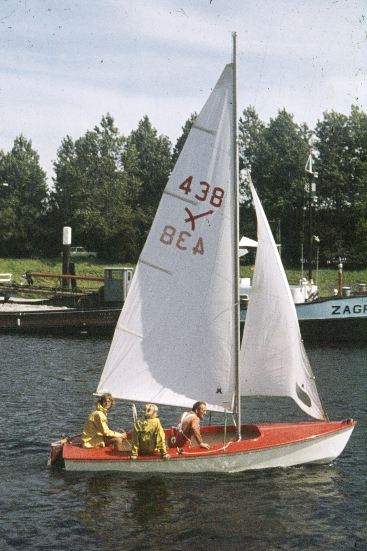 De Flying Arrow SHALOM in de Rijkshaven van Numansdorp